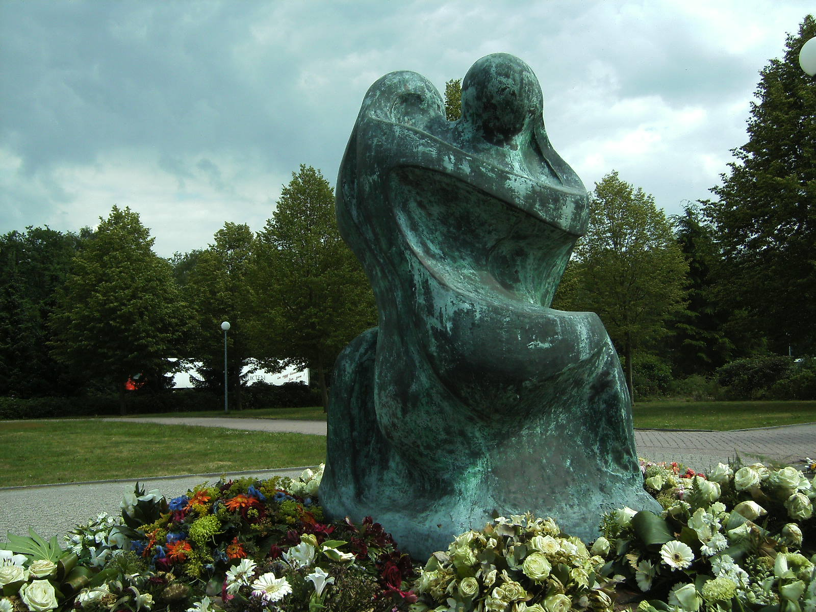 Bronzen beeld van Fred Tuijnman voor de toegang tot crematorium Steenbrugge te Diepenveen